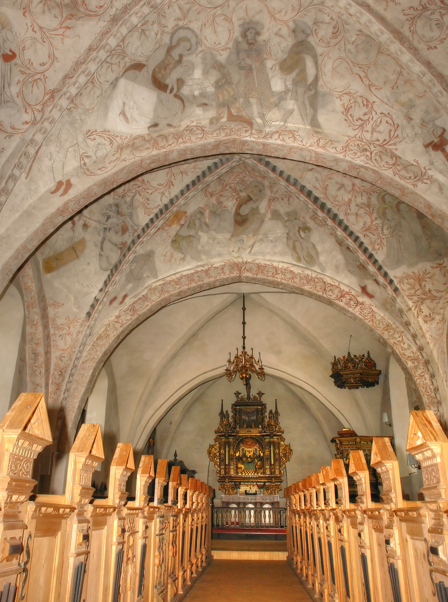 Kirche von Undløse, Dänemark (West-Seeland). Kalkmalerei um 1430–50 vom Unionsmeister. Altar von 1644